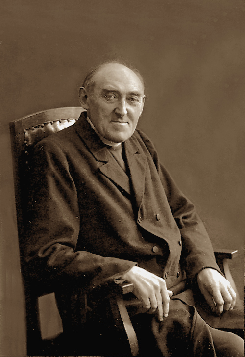 Mikławš Bjedrich-Radlubin